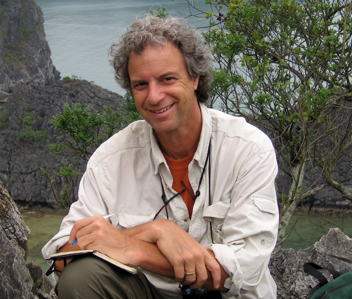 Jeff Greenwald